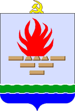 Герб Боровичей 1969 года, Новгородская область